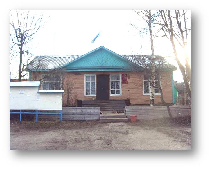 Администрация сельского поселения «Пажга»